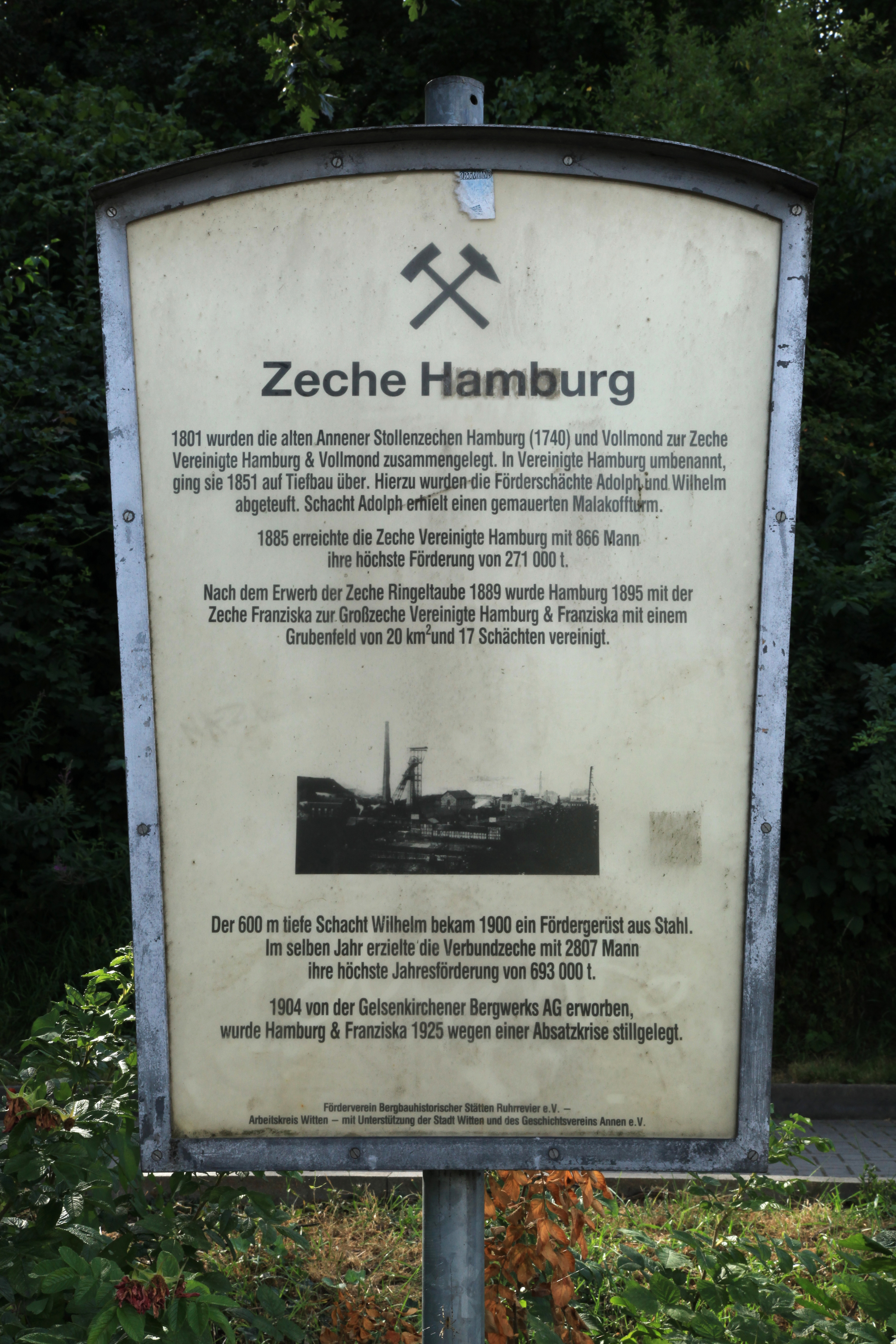 Schild zur Zeche Hamburg an der Herdecker Straße in Witten-Annen